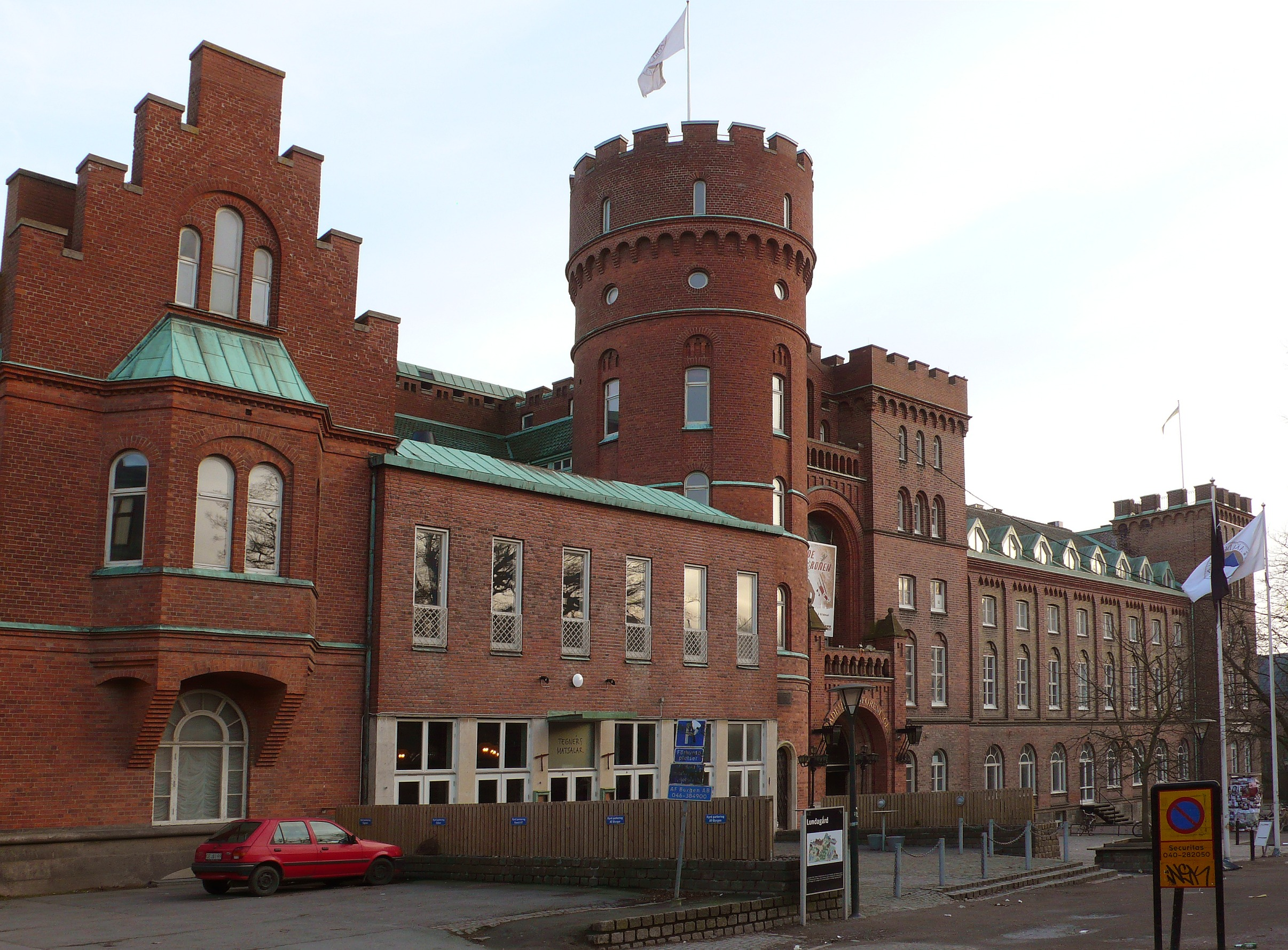 Gebäude der Akademischen Vereinigung in Lund, Schweden